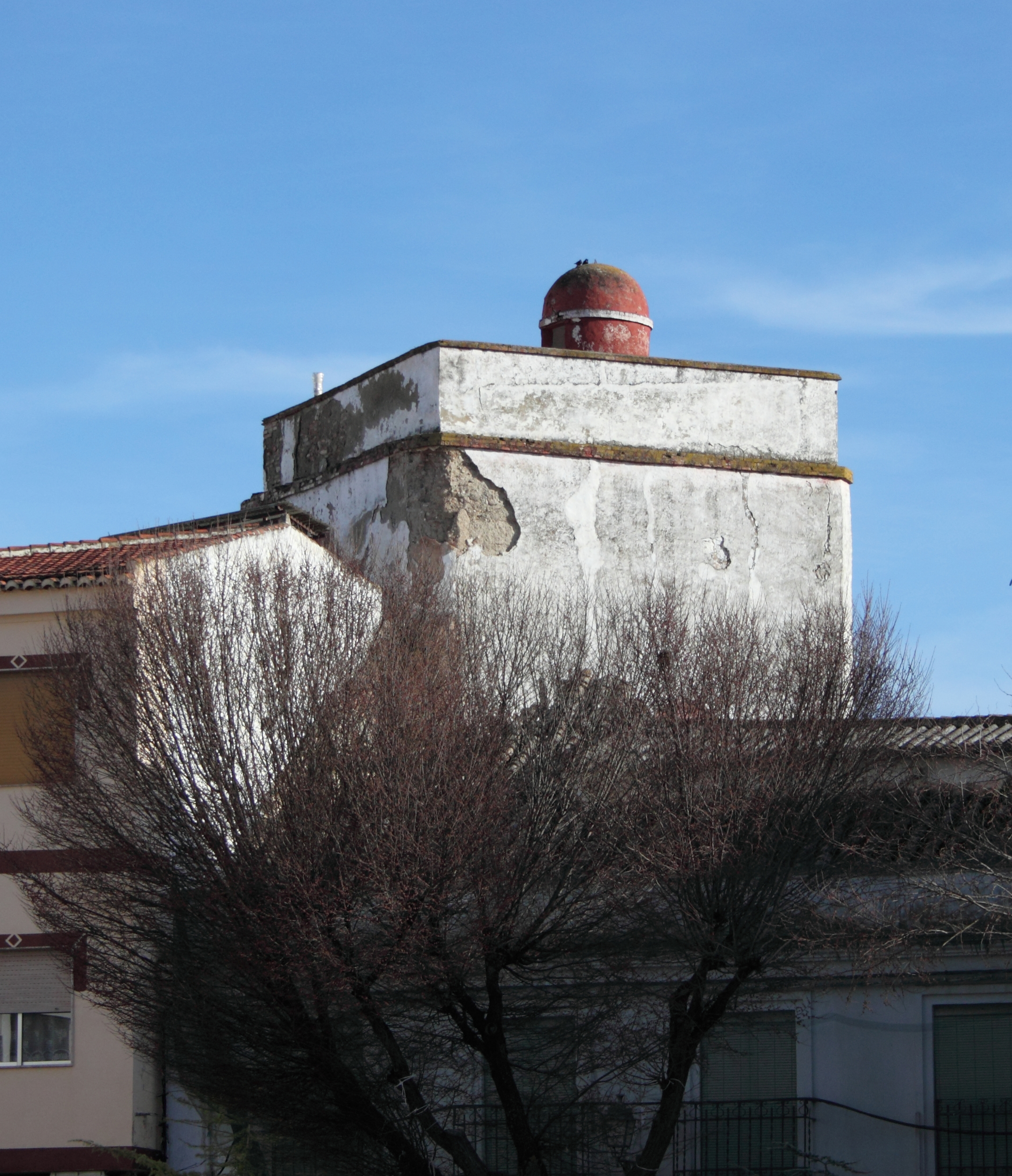 Vista detalle del Torreón de Huétor-Tájar.